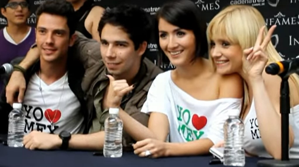 Firma de autógrafos en centro comercial Metropolis. Actores: Lisette Morelos, Ruy Senderos, Aldo Gallardo, y Eréndira Ibarra.